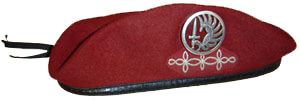 Description béret du 1er R.H.P. Date1977SourceSelf-photographedAuthorfantassin 72 béret du 1er R.H.P.